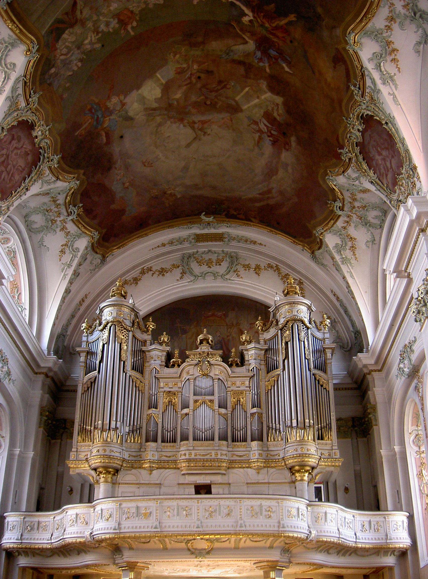 Ignazkirche - Orgel, Fresko von Johann Baptist Enderle